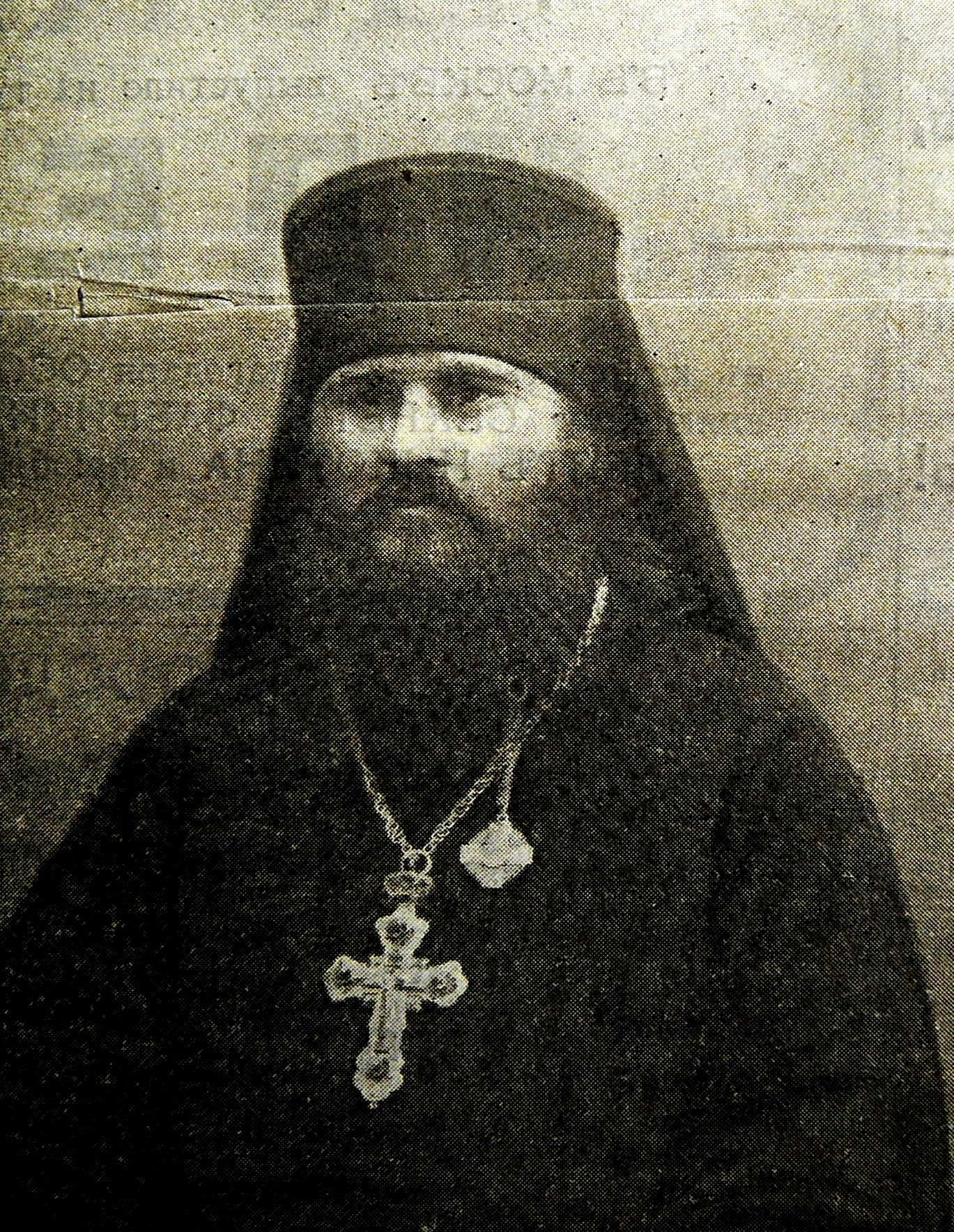 Настоятель Казанского Спасо-Преображенского монастыря архимандрит Иоасаф (И.И. Удалов).